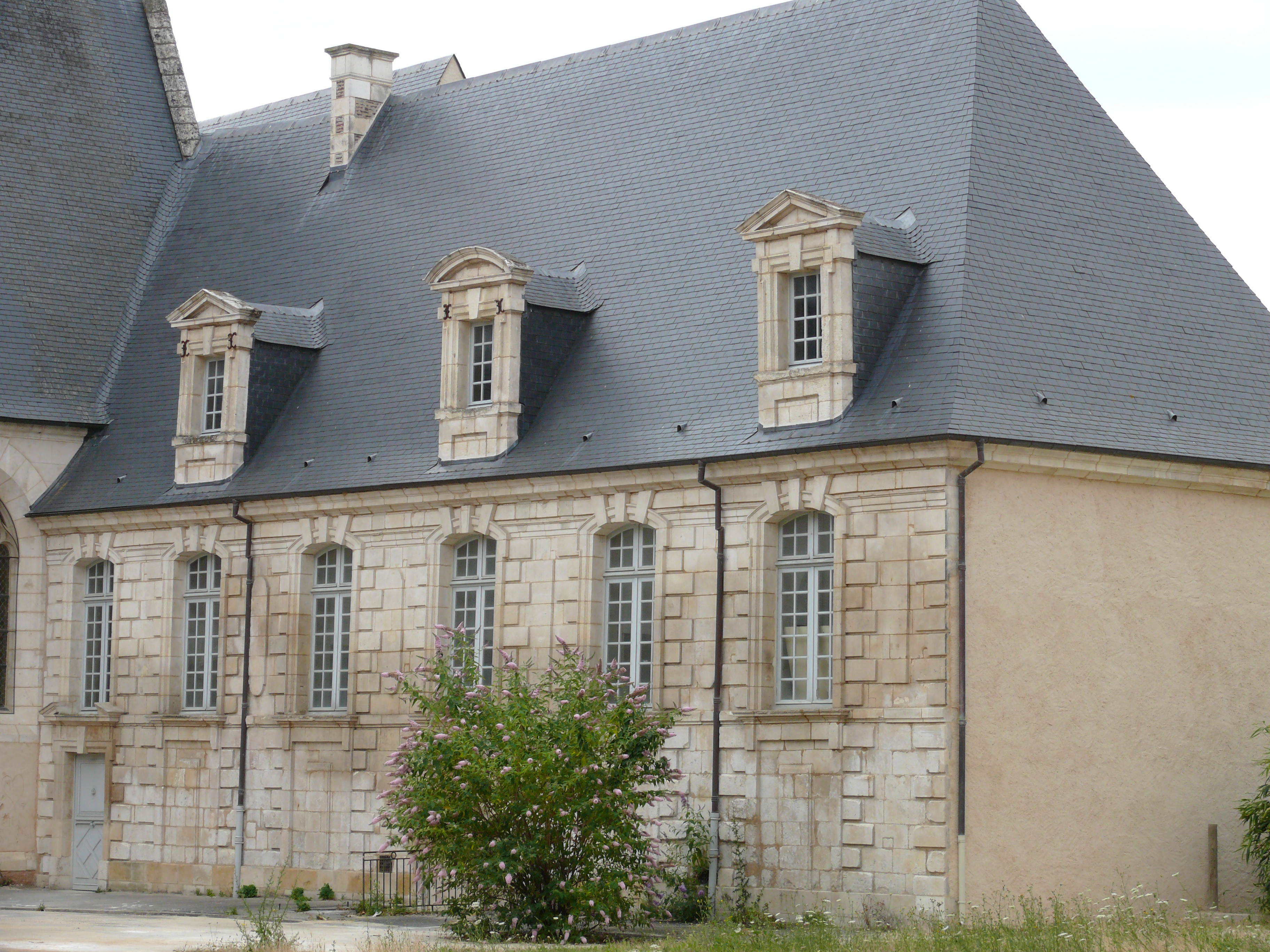 Bourges - Hôtel-Dieu - Aile en retour construite après 1628 par Jean Lejuge